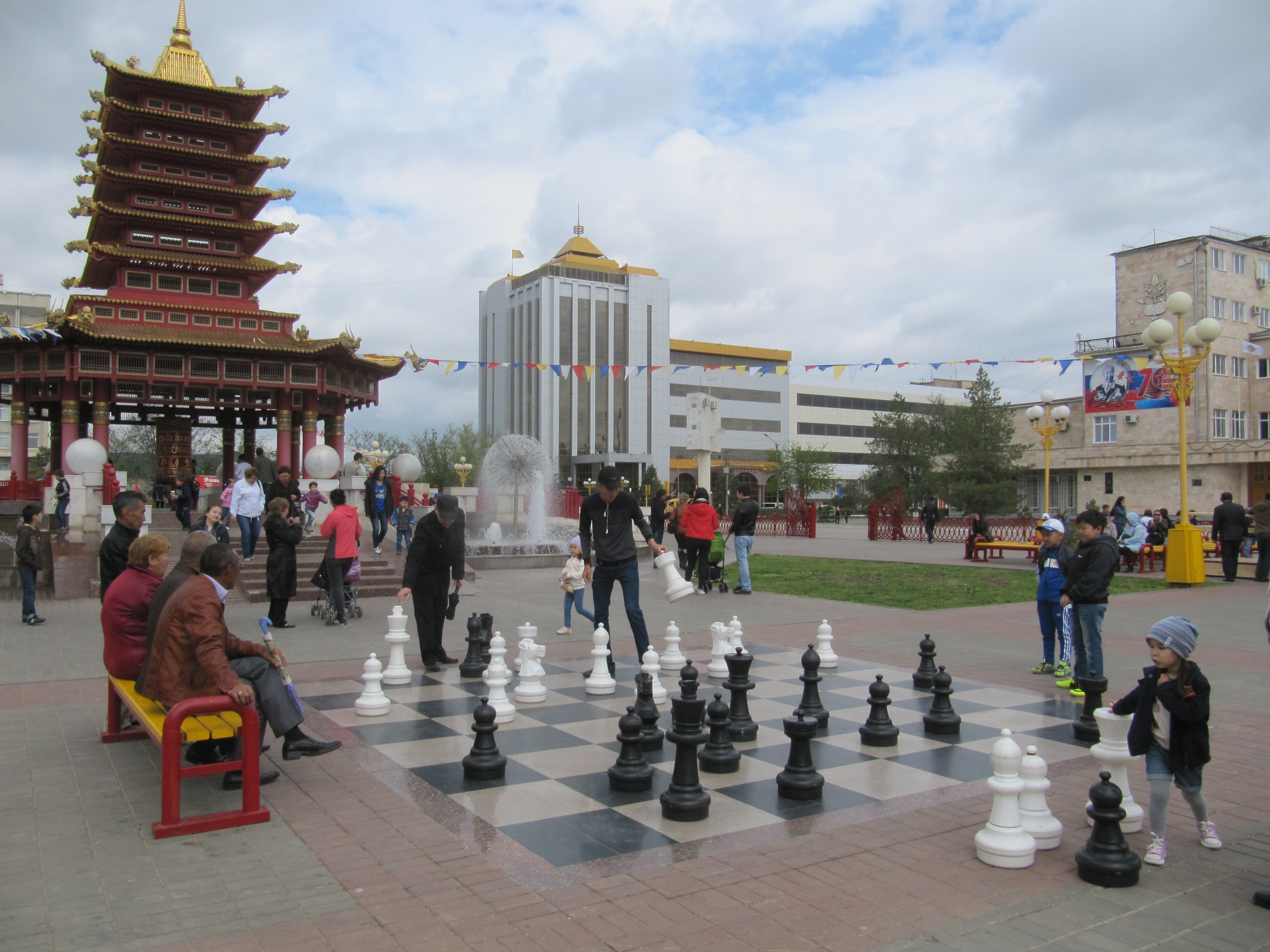 Игра в шахматы около пагоды Семи Дней в Элисте, Калмыкия